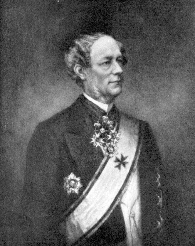 Fredrik August Ekström (1816–1901). Frack med ordensdekorationer, gulbrun fond.